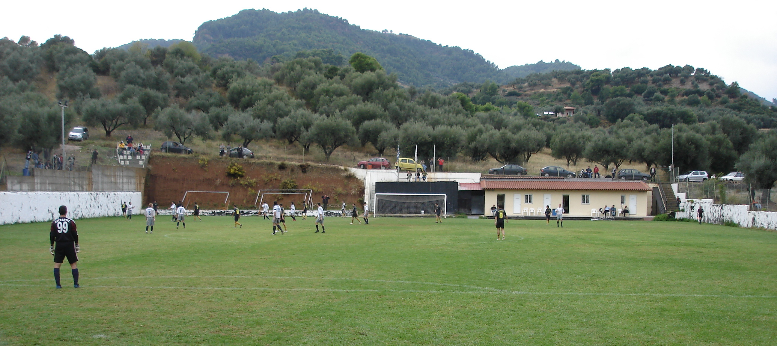 Ziria Groud Achaea Greece Γήπεδο Ζήριας Αχαΐας